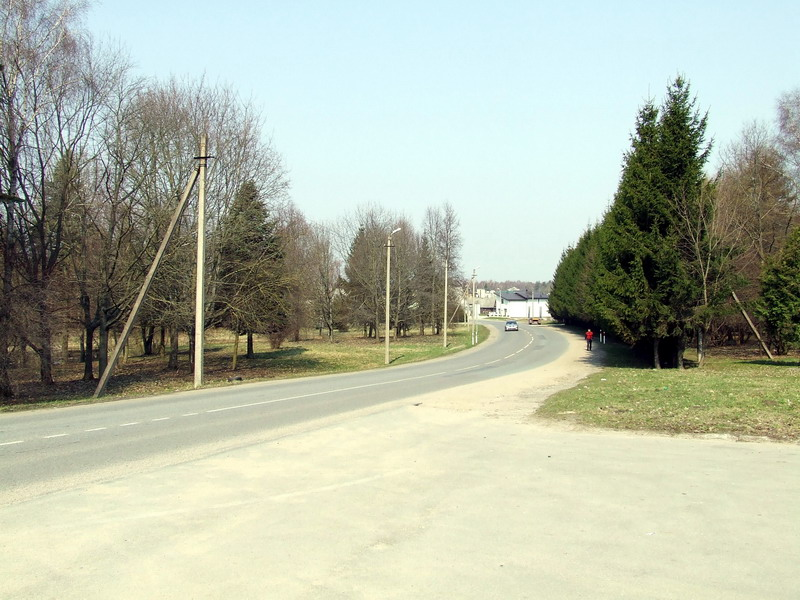 Centrinė gatvė Ramučiuose, Kauno raj.